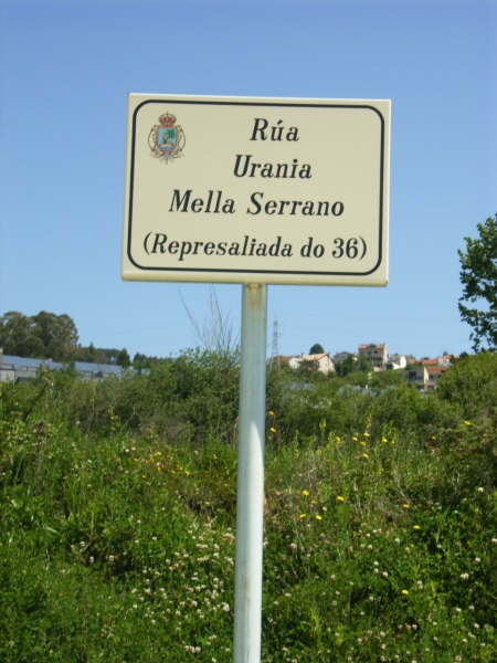 Letrero de la calle dedicada en Vigo a Urania Mella